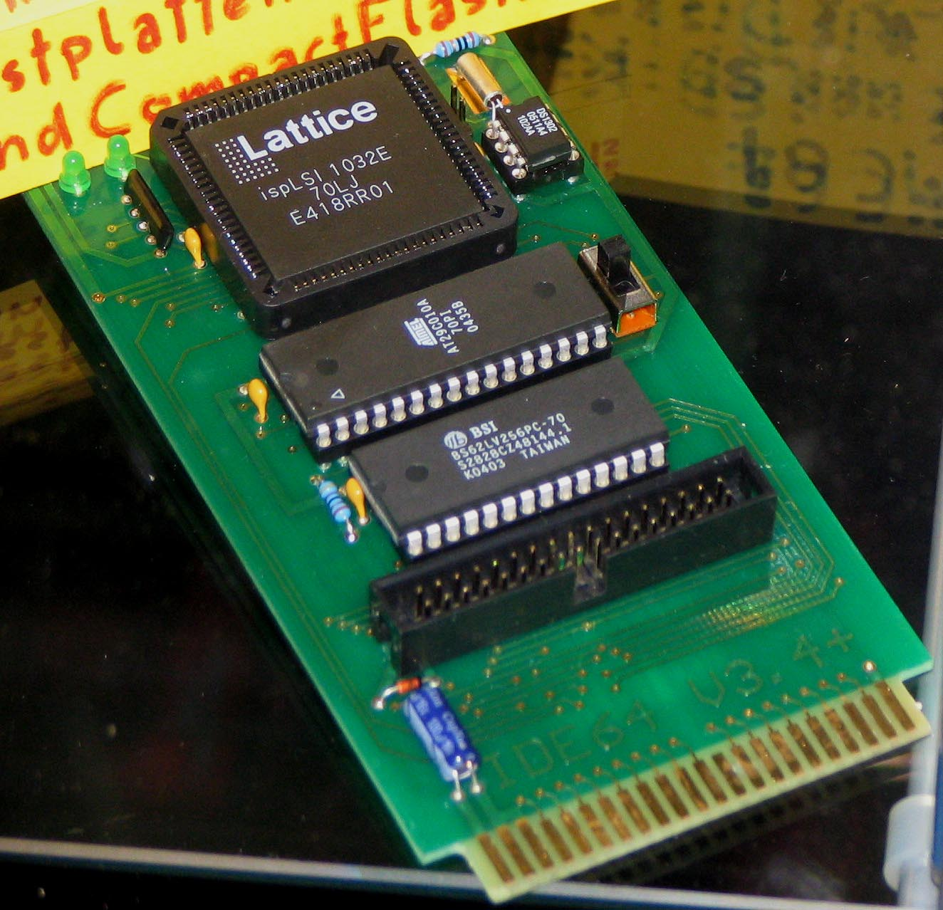 Erweiterungskarte für IDE-Laufwerke, CD-ROMs und sog. Flash EEPROM Module für den C64 (Der Verkäufer hatte falsch beschriftet.) Quelle: Selbst fotografiert auf der GC 2005, Leipzig.